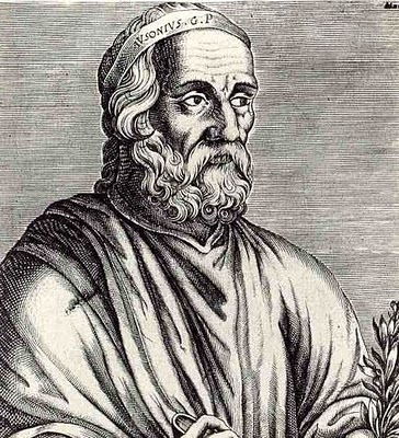 Ausonius, Roman poet